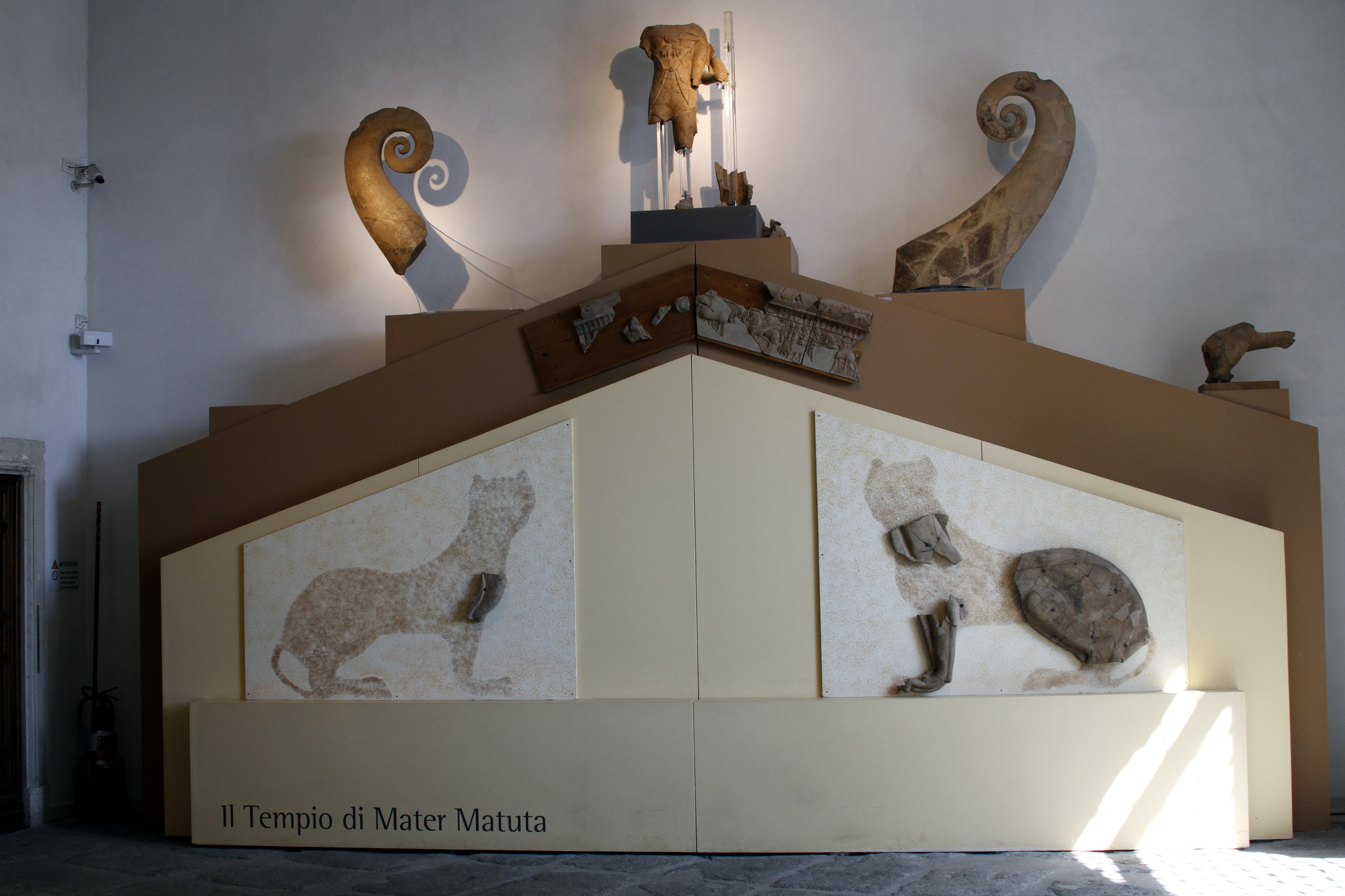 Palazzo dei Conservatori - Musei Capitolini - Rome